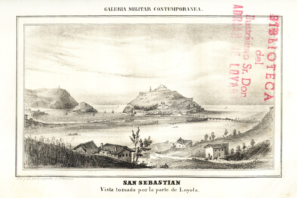 Vista de San Sebastián. "Galería Militar Contemporánea". Madrid 1846